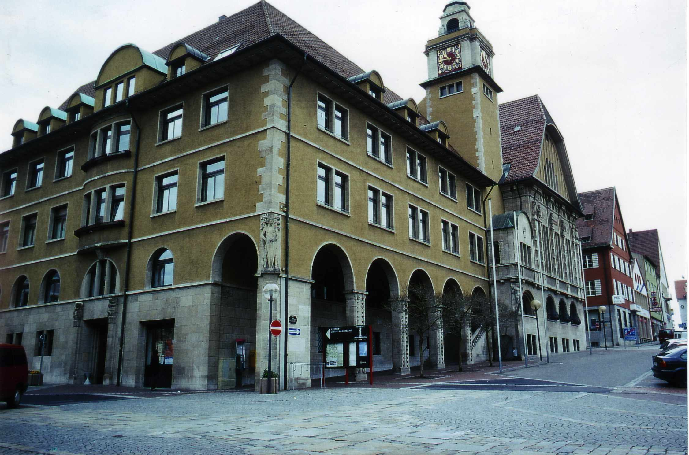 Quelle: Stadtarchiv Albstadt